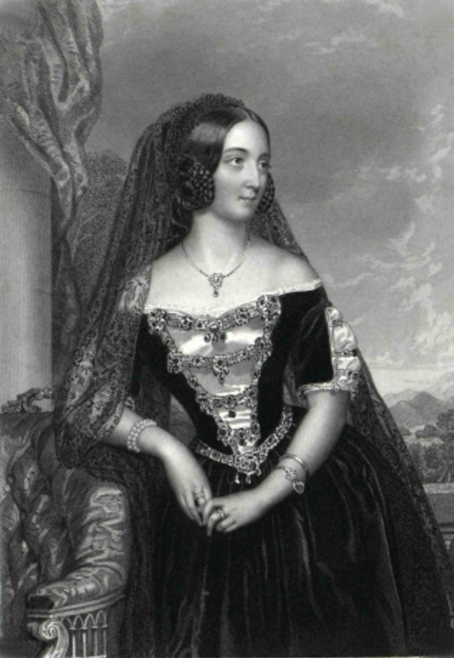 Gróf Károlyi Györgyné, Zichy Karolina grófnő / rajzoló Barabás Miklós